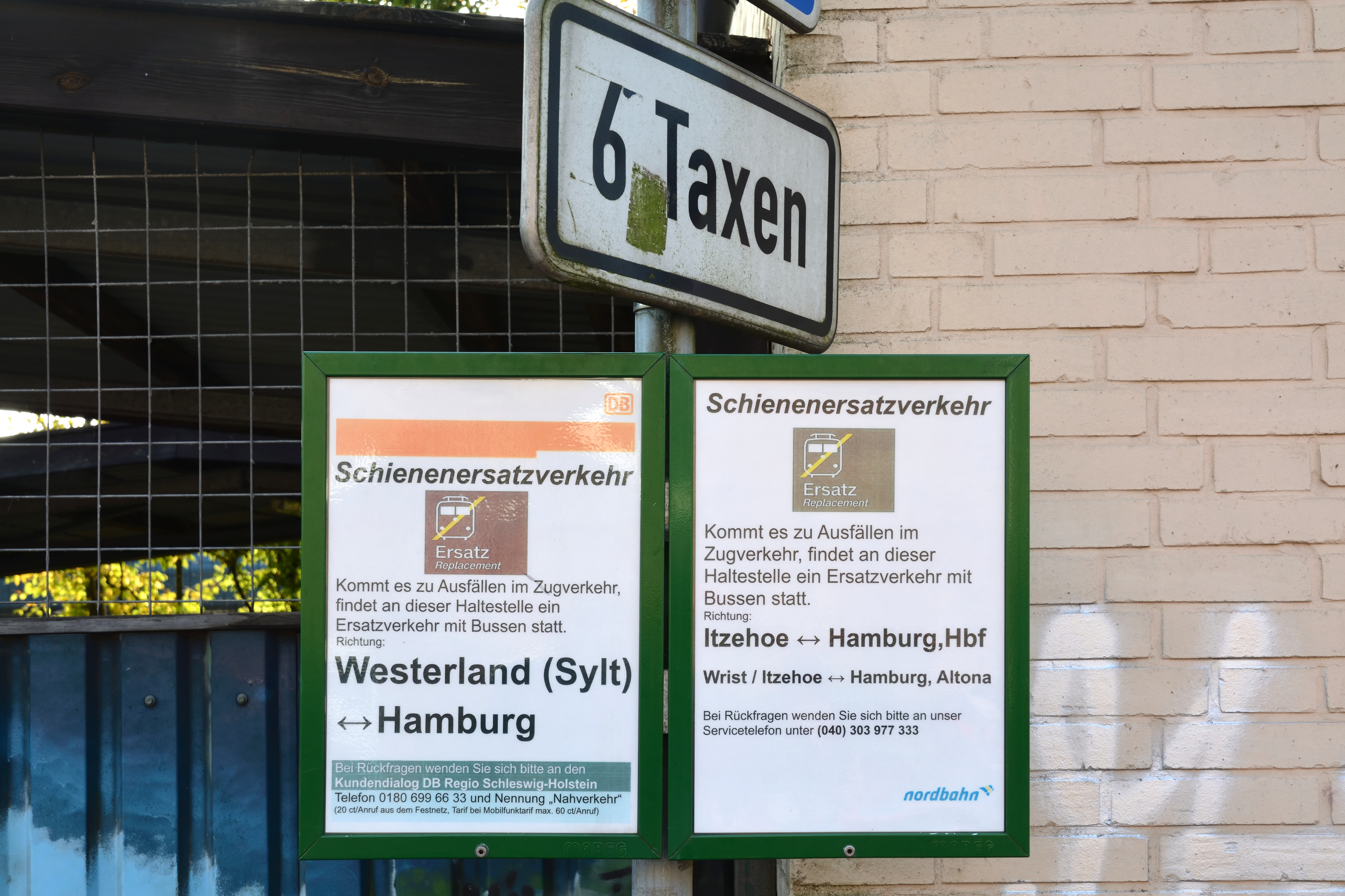 Schienenersatzverkehr in Schleswig-Holstein. Haltestelle am Bahnhof Itzehoe.